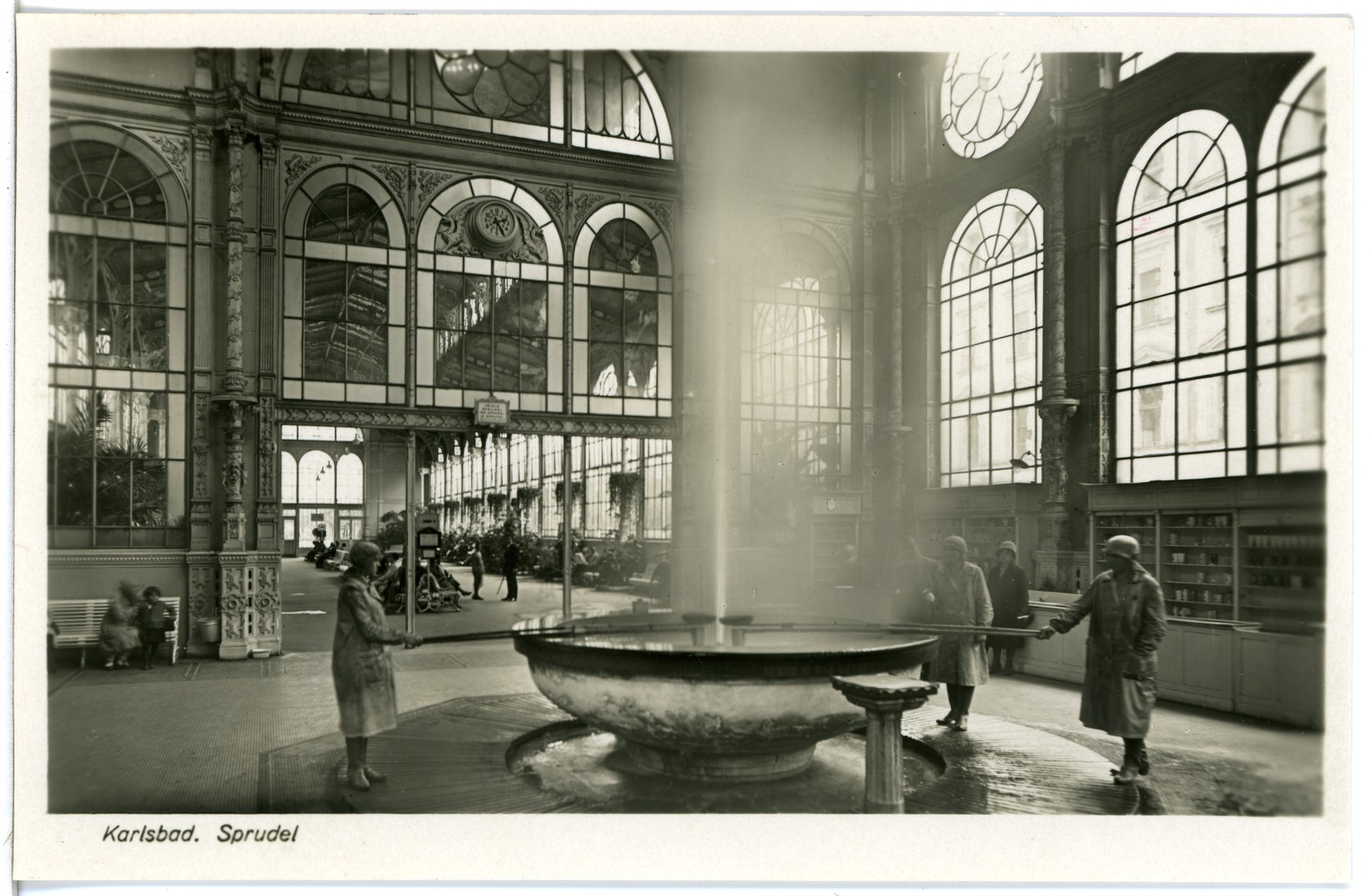 Karlsbad; Sprudel This postcard is from publisher Brück & Sohn in Meißen ( postcard has a unique number 25534 and is available in a higher resolution at the publisher. This images was uploaded in a cooperation project between Wikipedians and the publisher.